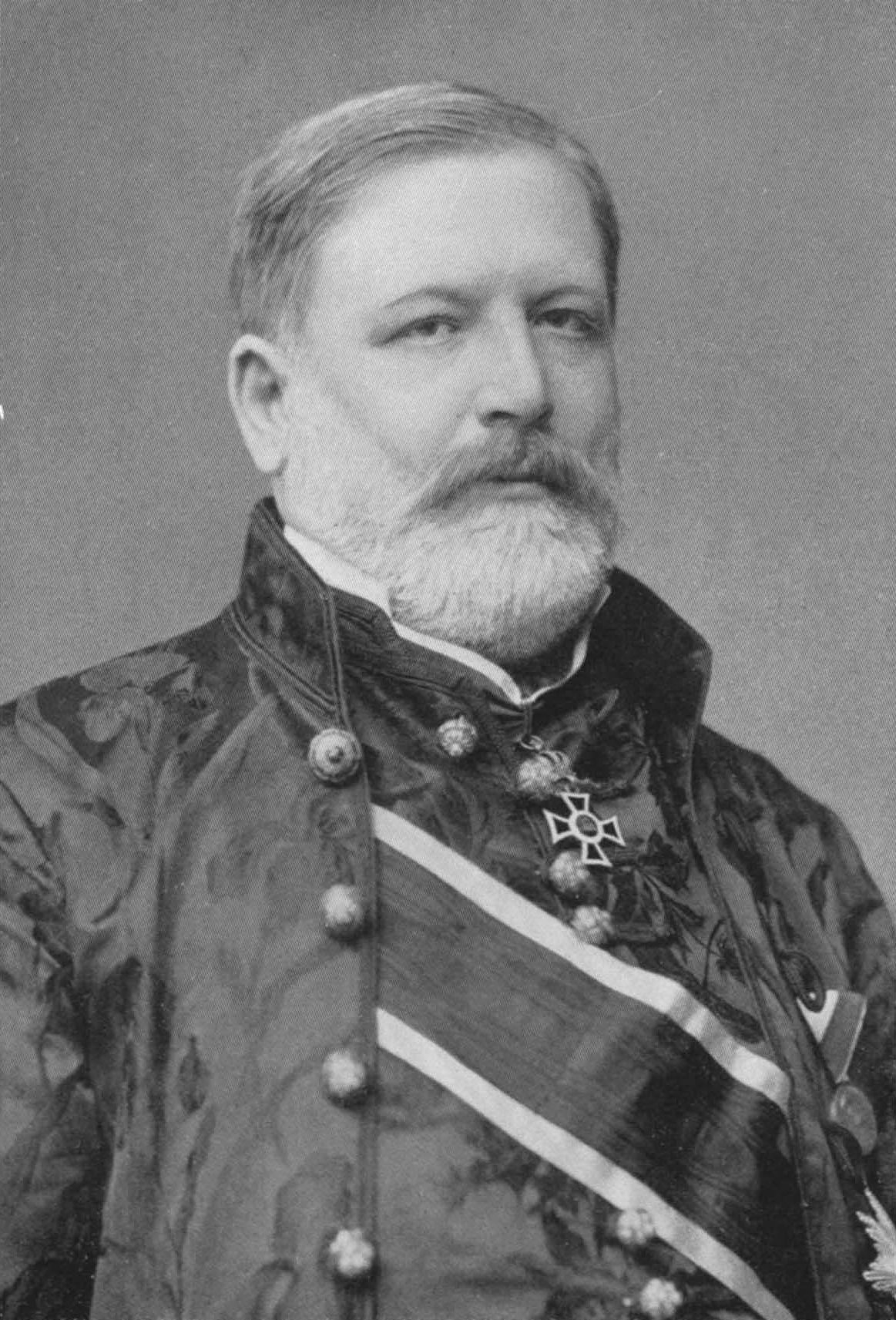 Láng Lajos (1849-1918) statisztikus, politikus